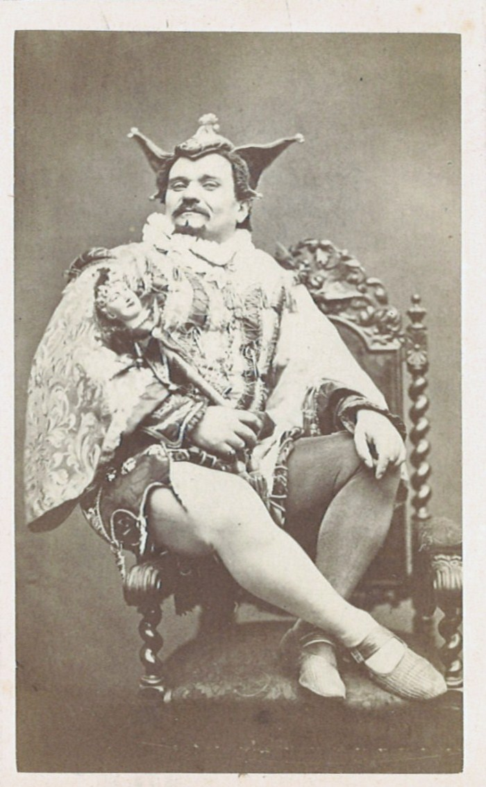 Portrait d'Ismaël par Carjat, publié sur FlickR par Bialystok-Stavenuiter et autorisation de reproduction donnée par lui le 9 décembre 2012